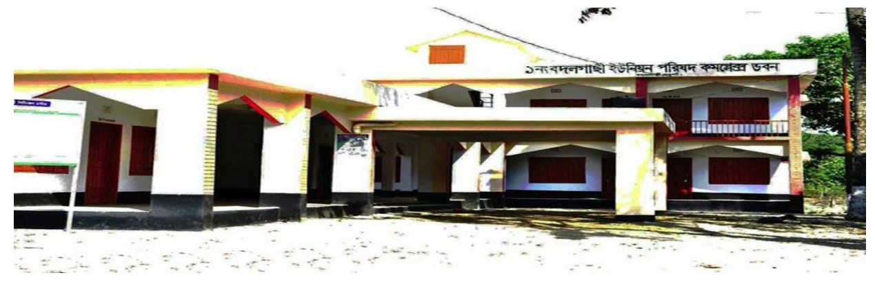 বদলগাছী ইউনিয়ন পরিষদ